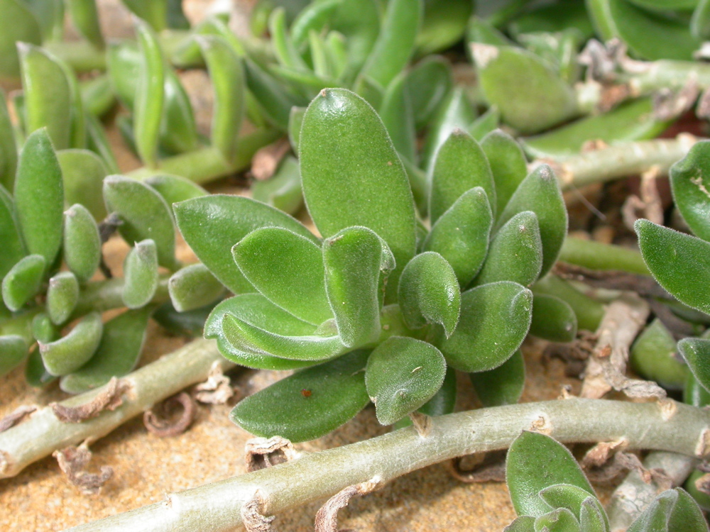 Kleinia implexus